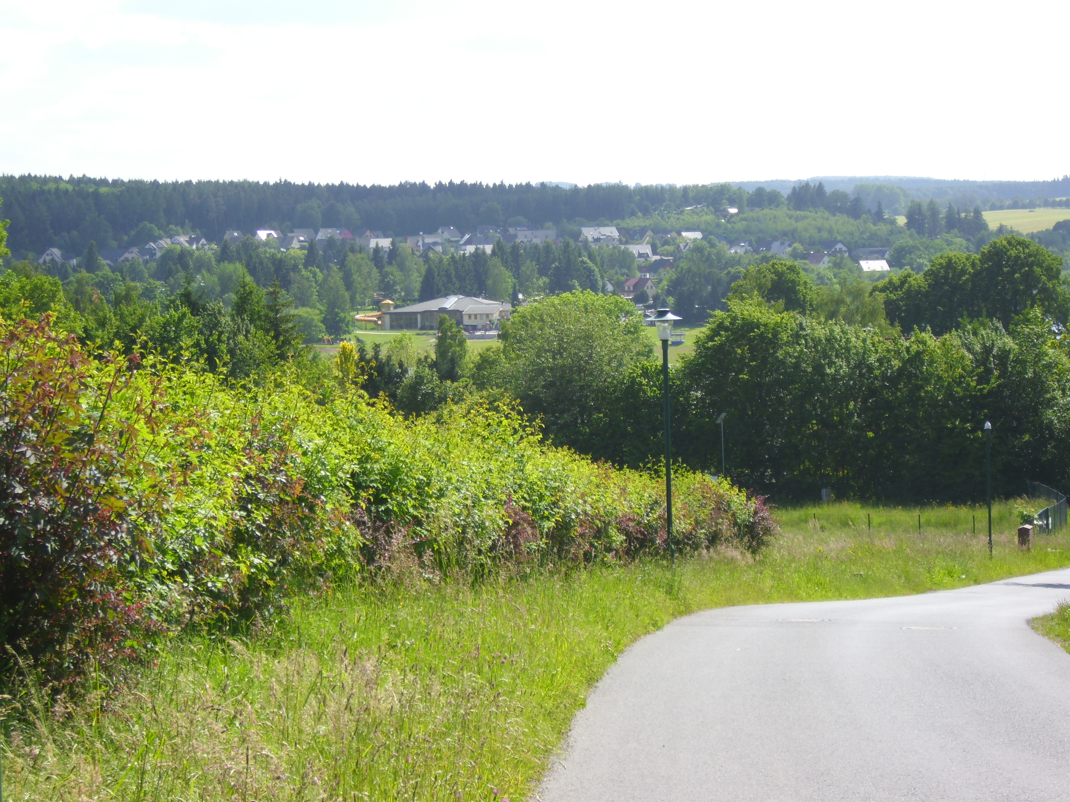 Blick auf Paulsdorf vom Sonnenhang in Malter.